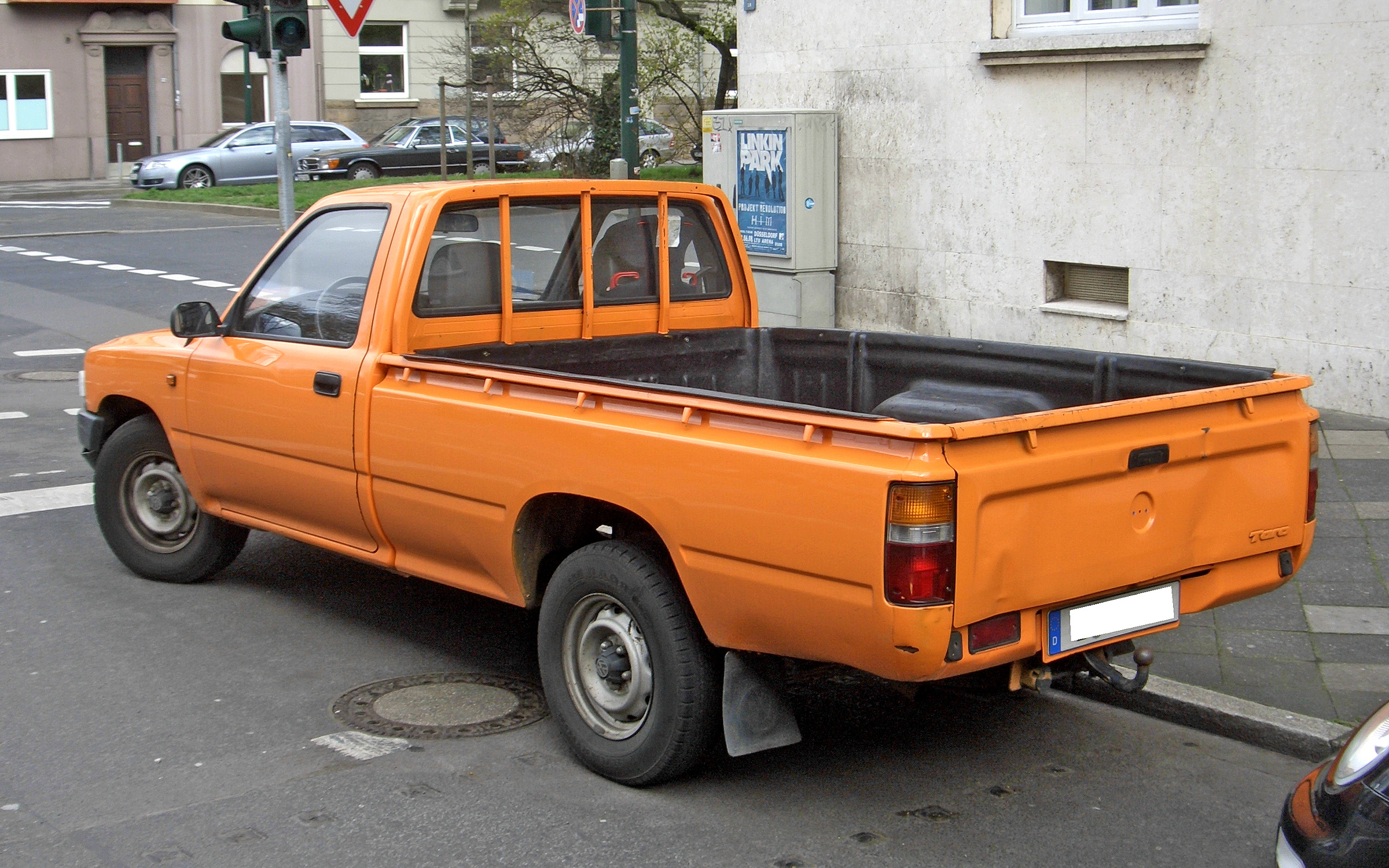 VW Taro, 1989-1997, seen in Duesseldorf, Germany